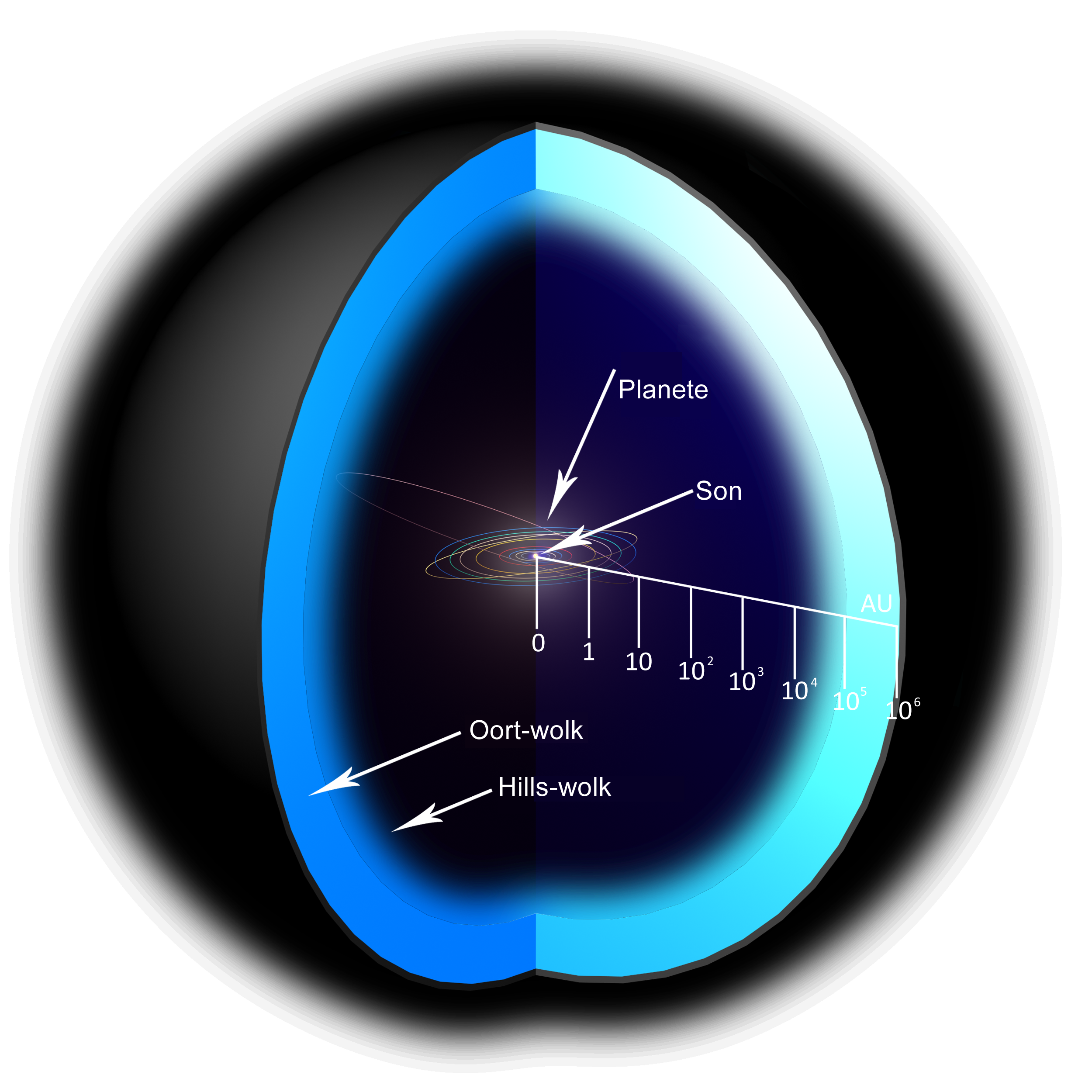 Die Oort-wolk